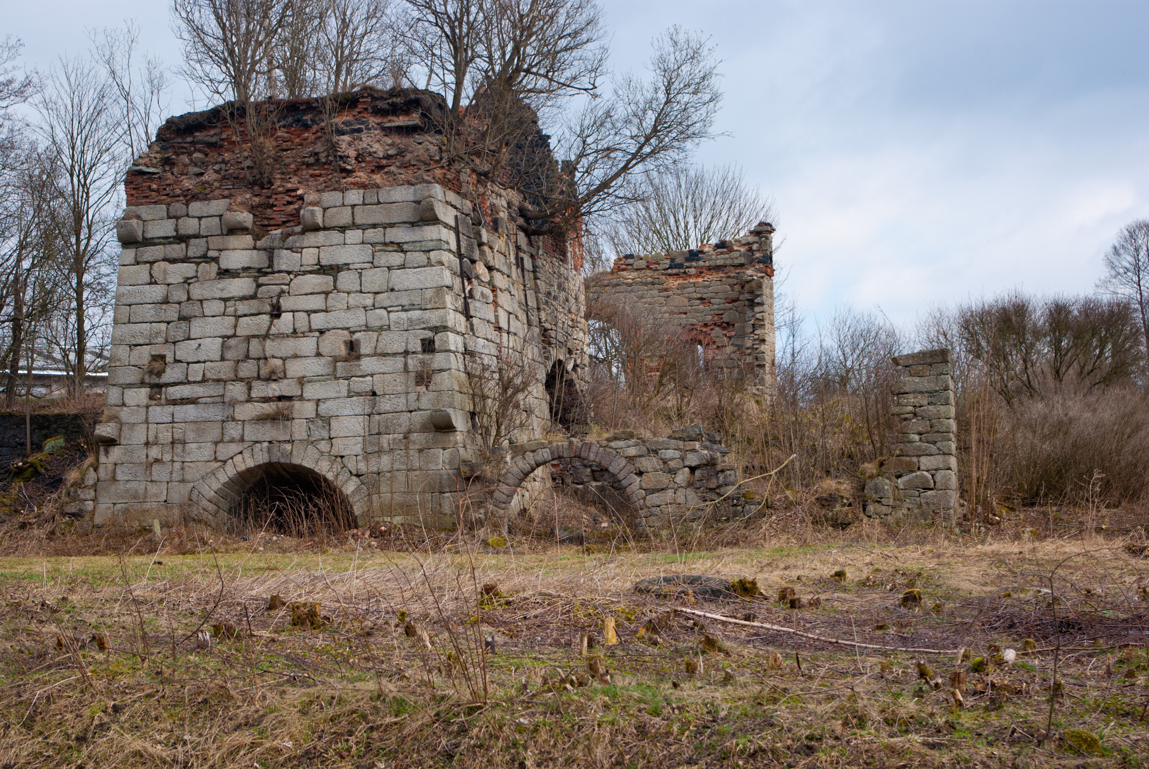 Železárna - vysoká huť (Šindelová), Šindelová